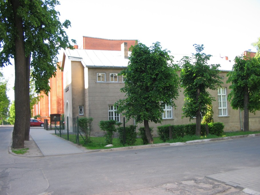 Valmieras 7.dienas adventistu un baptistu baznīca